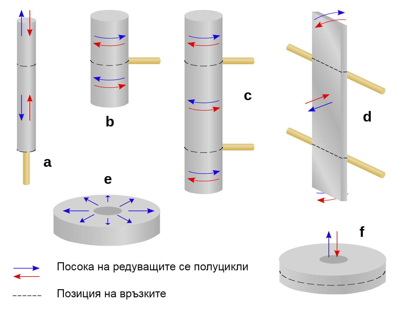 Резонансни режими на механичен филтър